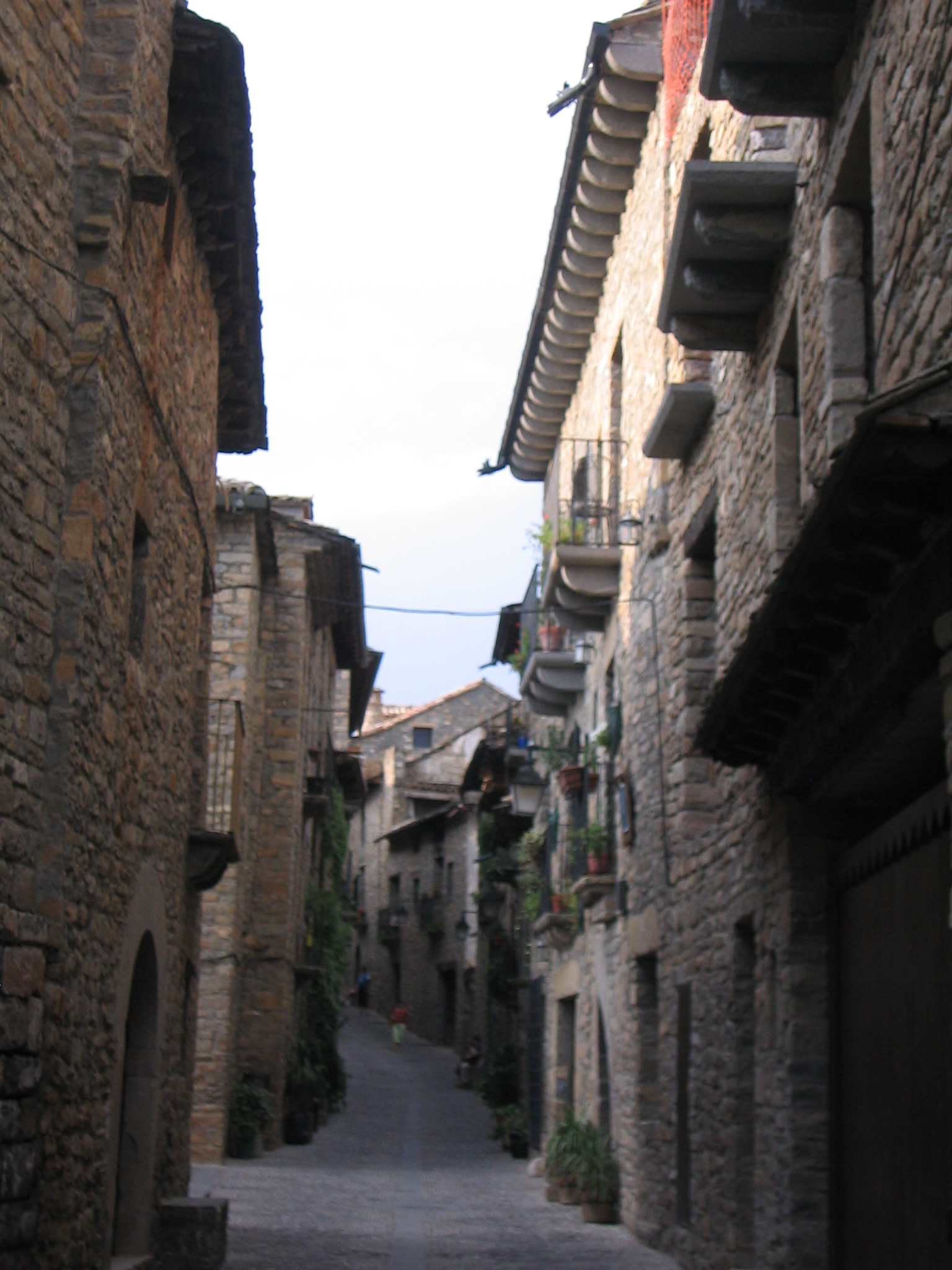 Calle de Aínsa, Huesca, Aragón (España).